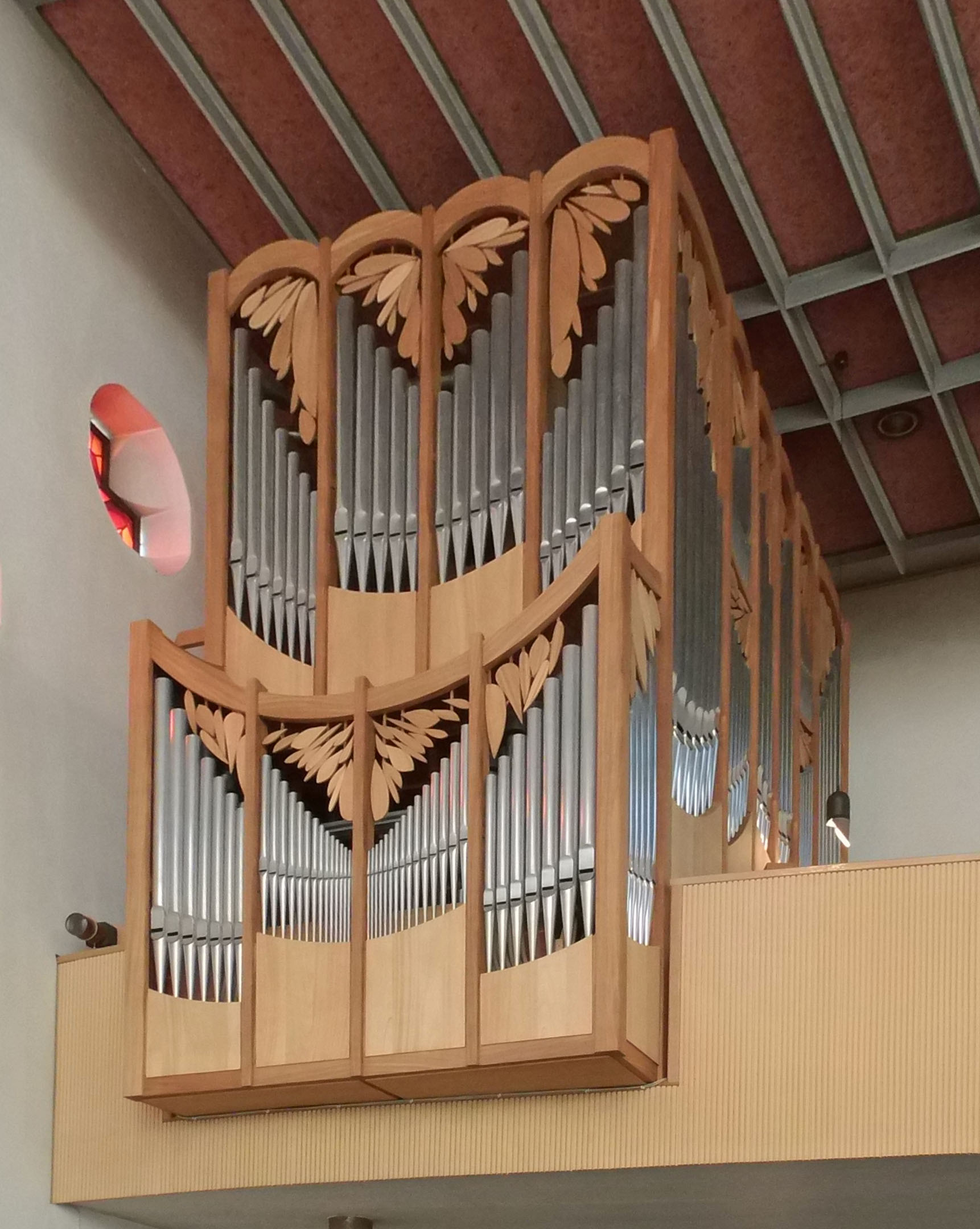 Orgel in der katholischen Kirche St. Joseph in Wolfsburg.